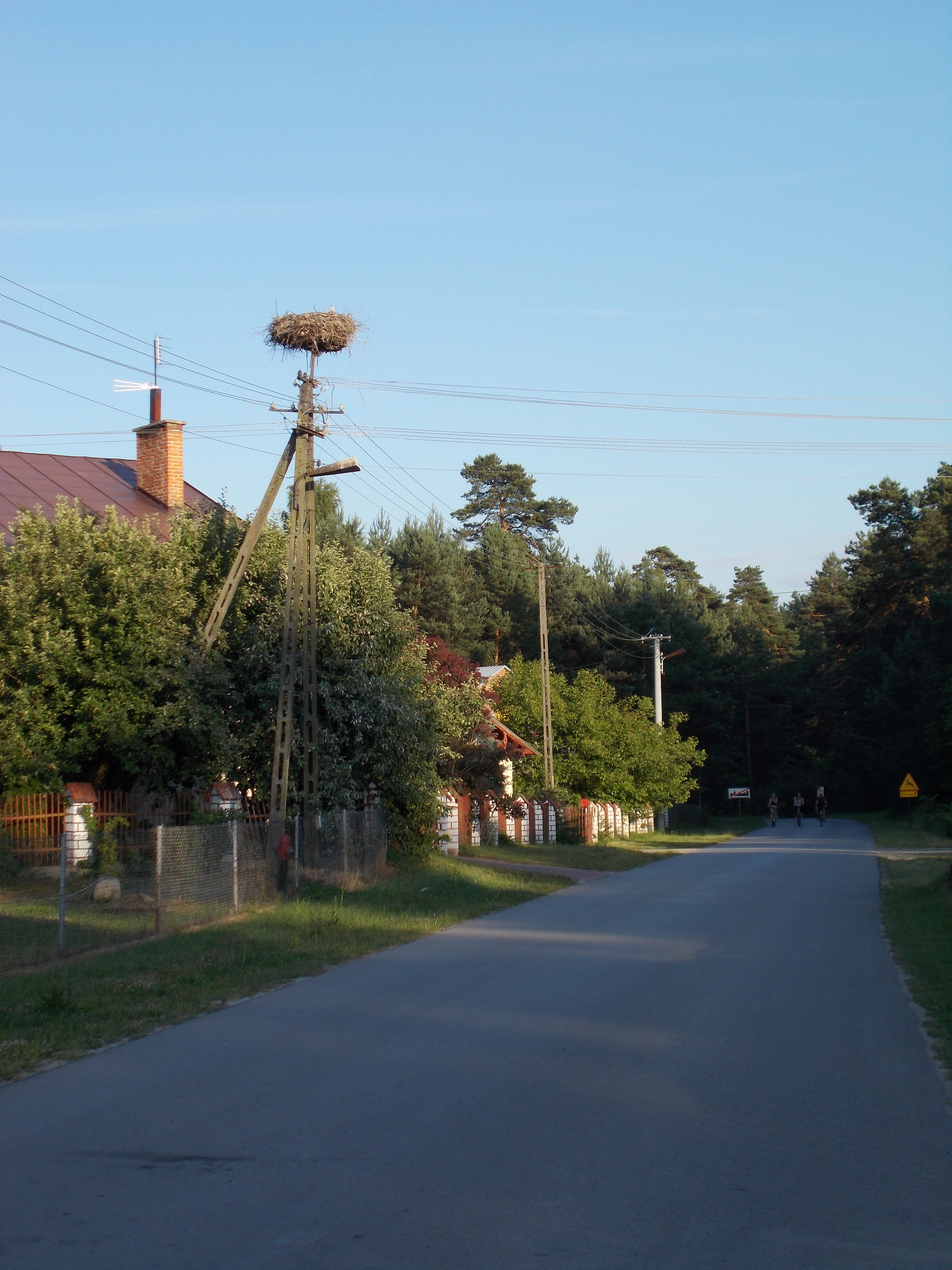 Bocianie gniazdo w miejscowości Karolówka w powiecie lubaczowskim